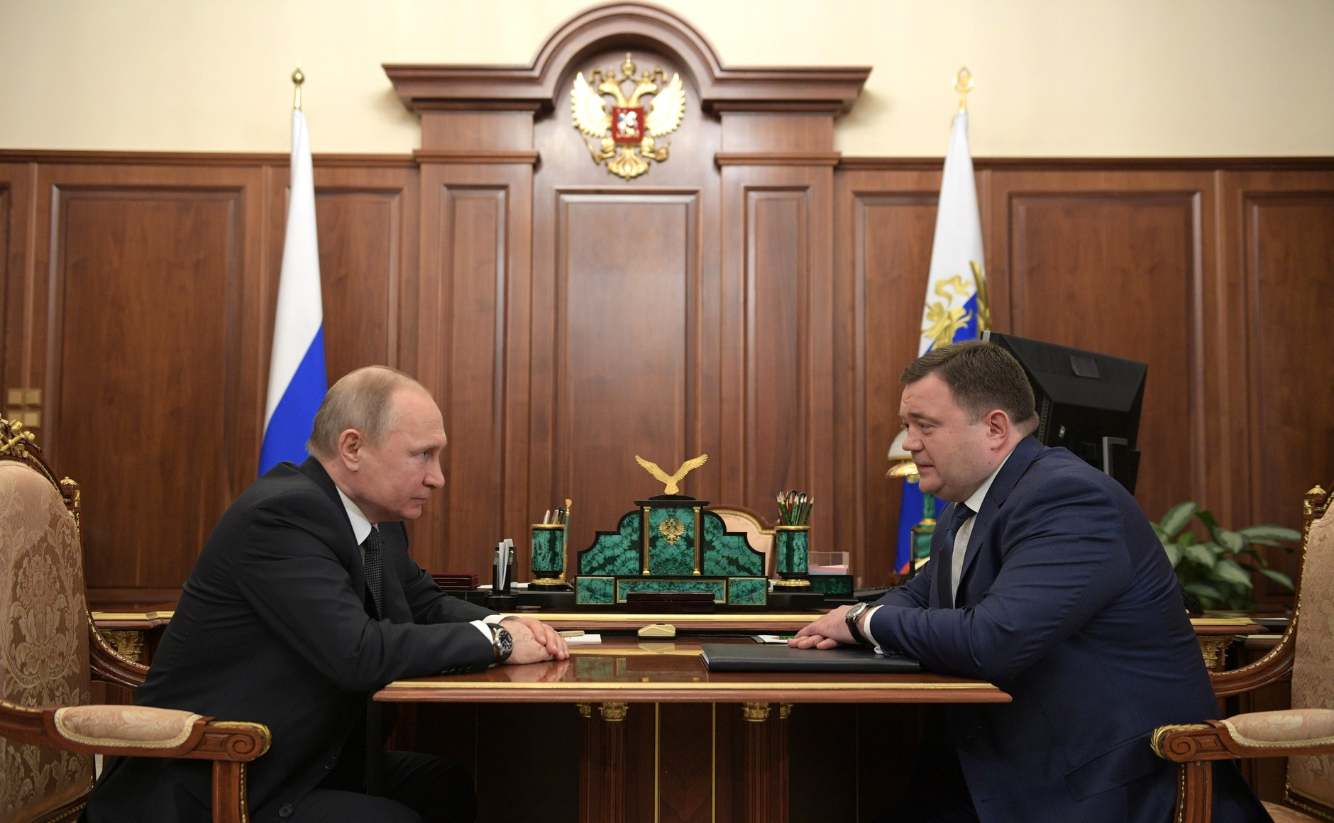 Встреча Президента России Владимира Путина с председателем Промсвязьбанка Петром Фрадковым